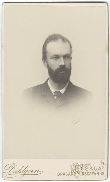 Den svenske docenten i praktisk filosofi Lawrence Heap Åberg (1851-1895) porträtterad av fotografen Alfred Dahlgren. Reproduktion av Uppsala universitetsbibliotek.